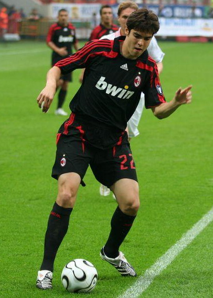 Kaka